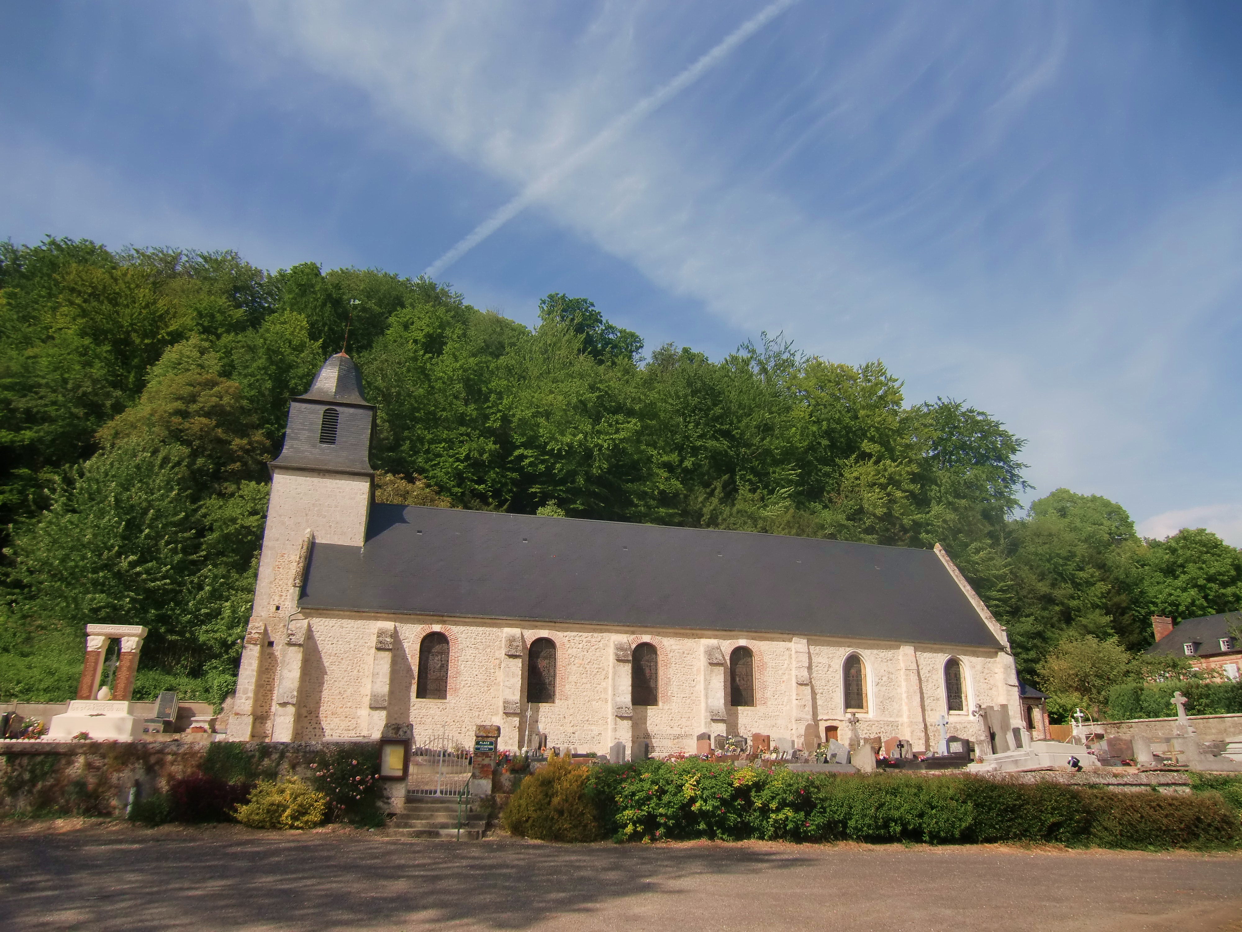 église de Saint-Pierre-du-Val (Eure, Normandie, France)